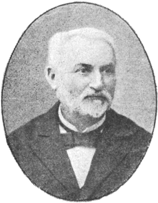 "M. Brice (Meurthe-et-Moselle)"